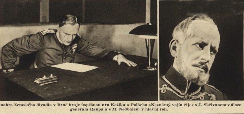 Bohumír Polách, František Kožík: Neznámý vojín žije!, Brno, 1937